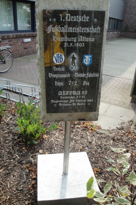 Denkmalstein zur 1. Deutschen Fussballmeisterschaft